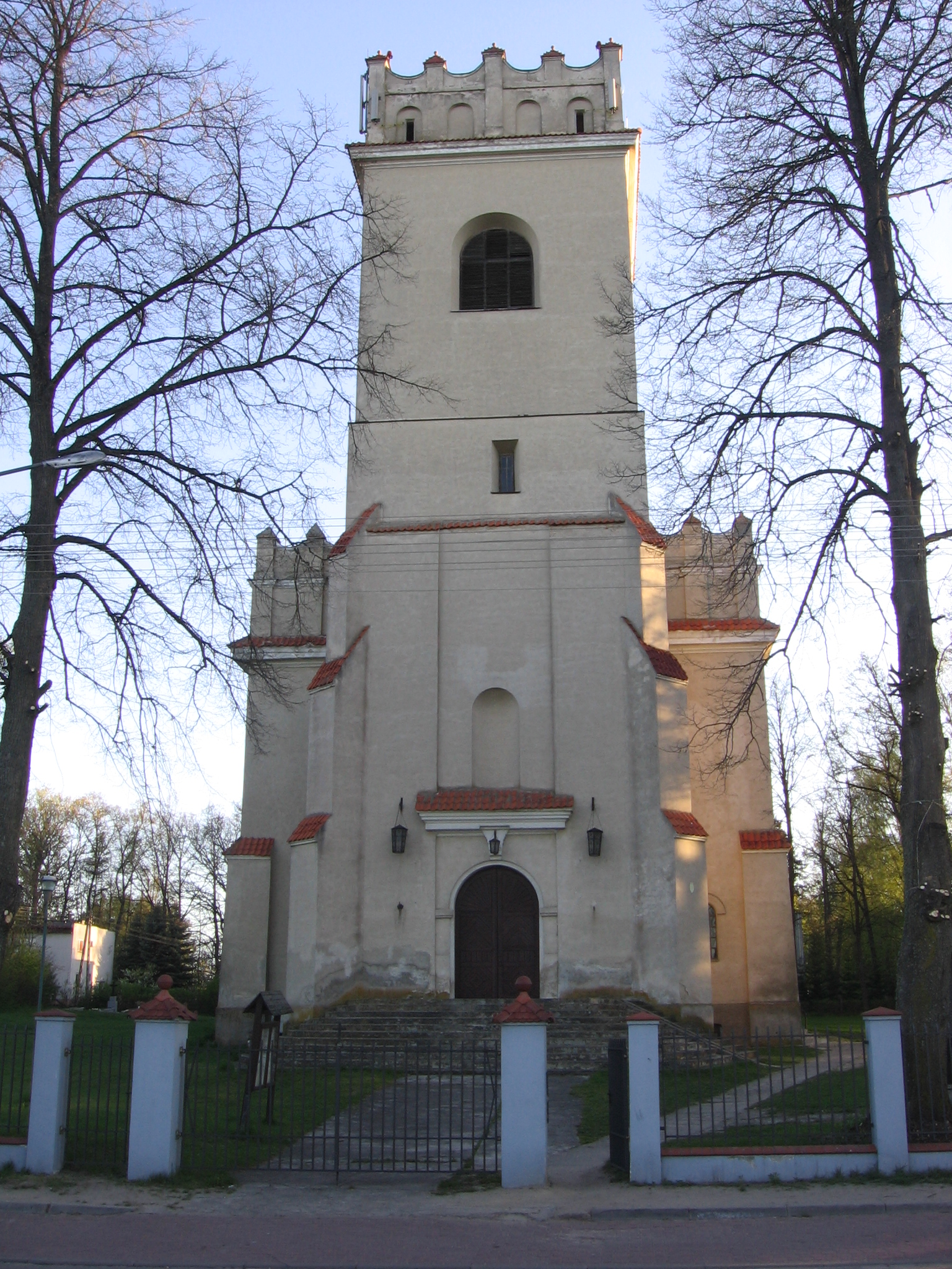 kościół katolicki w Białowieży